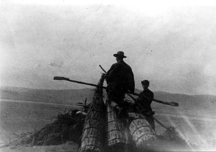 Martín Gusinde en los conchales de Pichilemu, 1917.